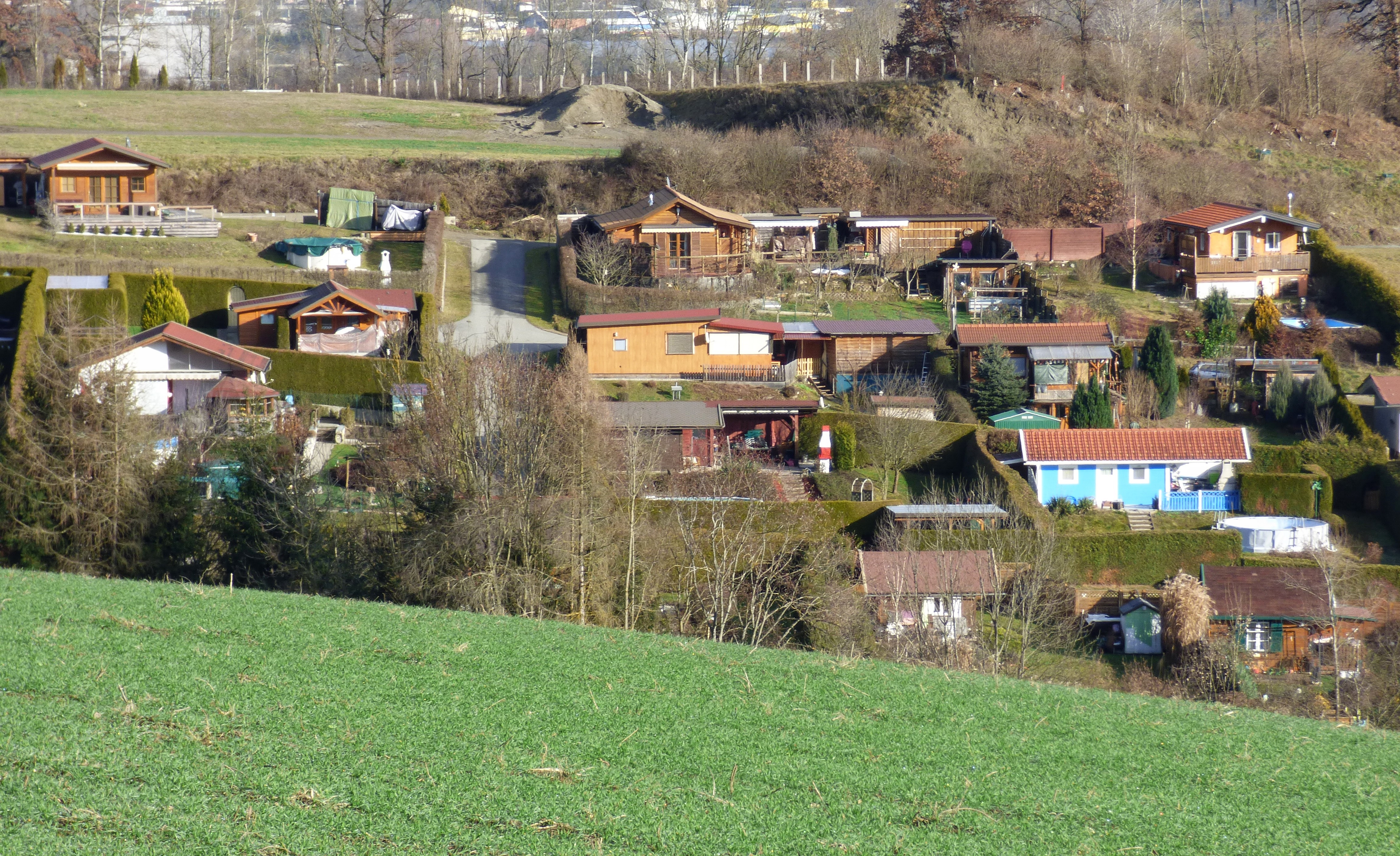 Schrebergartensiedlung Mailsberg, Gemeinde Frauenstein (Kärnten)